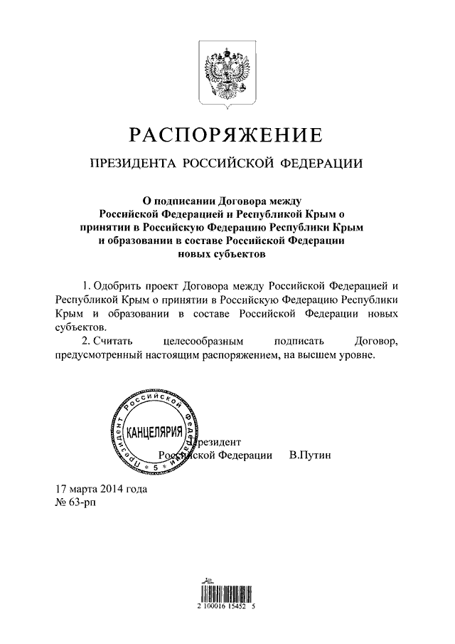 Распоряжение Президента Российской Федерации о подписании Договора о принятии Республики Крым в Российскую Федерацию.